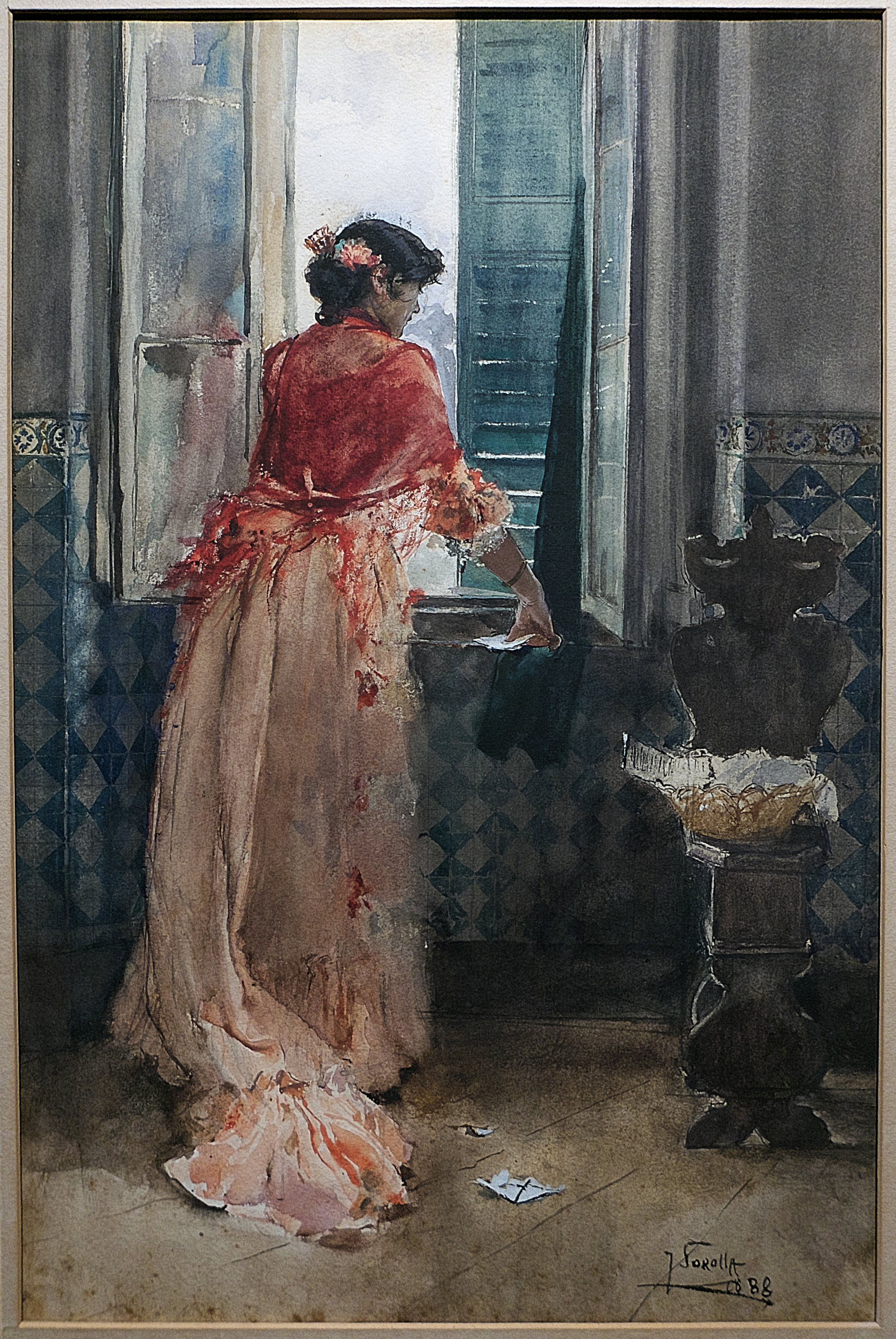 Pintura de Clotilde García. Acuarela sobre papel (1888).